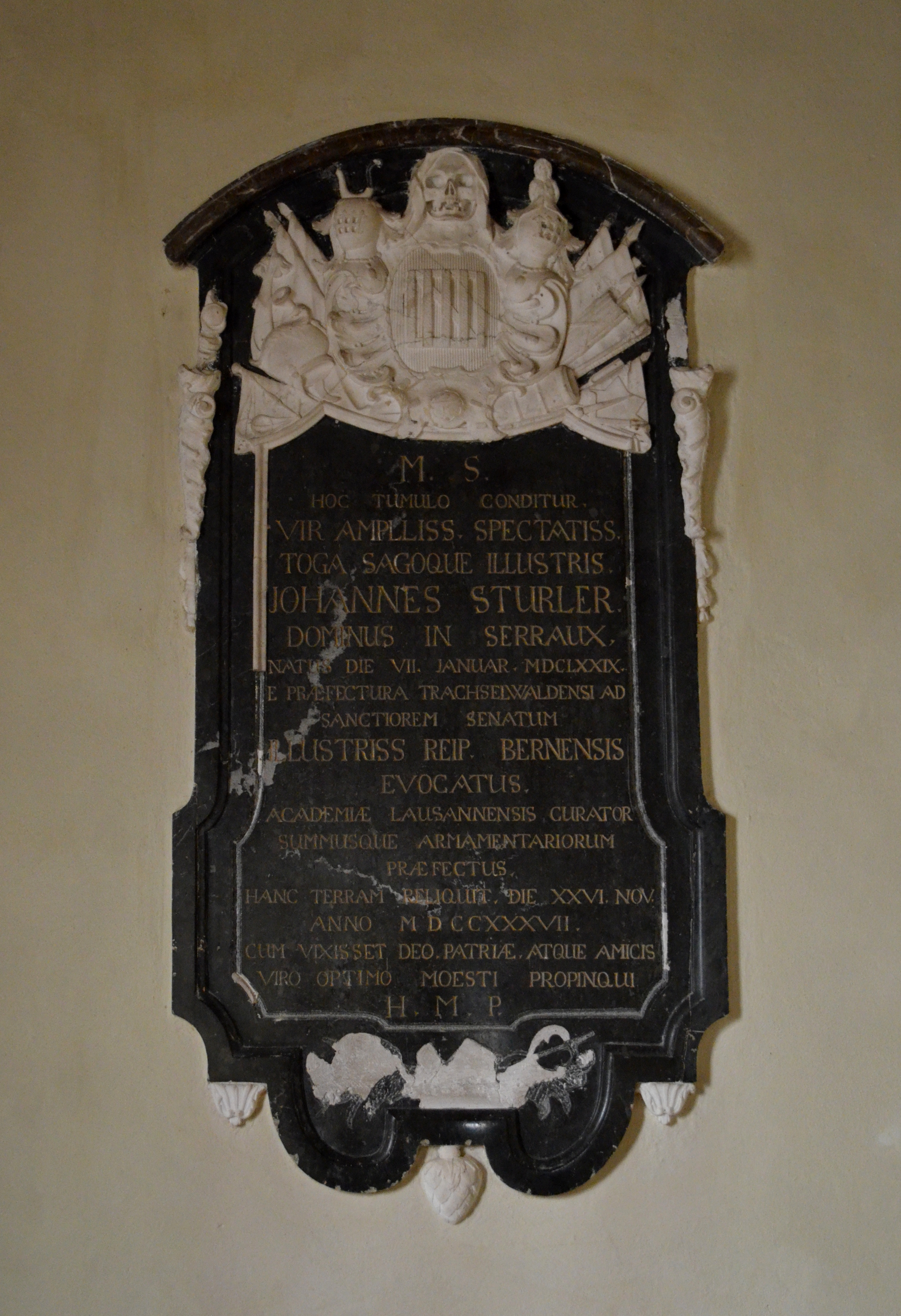 Begnins, Eglise, Epitaphe Jean Sturler (1679-1737), membre du Grand Conseil de 1710, capitaine en 1712, membre de la chambre d'appellation du pays de Vaud, bailli de Trachselwald, membre du Petit Conseil 1727, Zeugherr 1729, colonel en 1724.